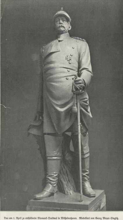 Das am 1. April zu enthüllende Otto von Bismarck-Denkmal in Wilhelmshaven, modelliert von Georg Meyer-Steglitz, Illustrirte Zeitung, 30. März 1905